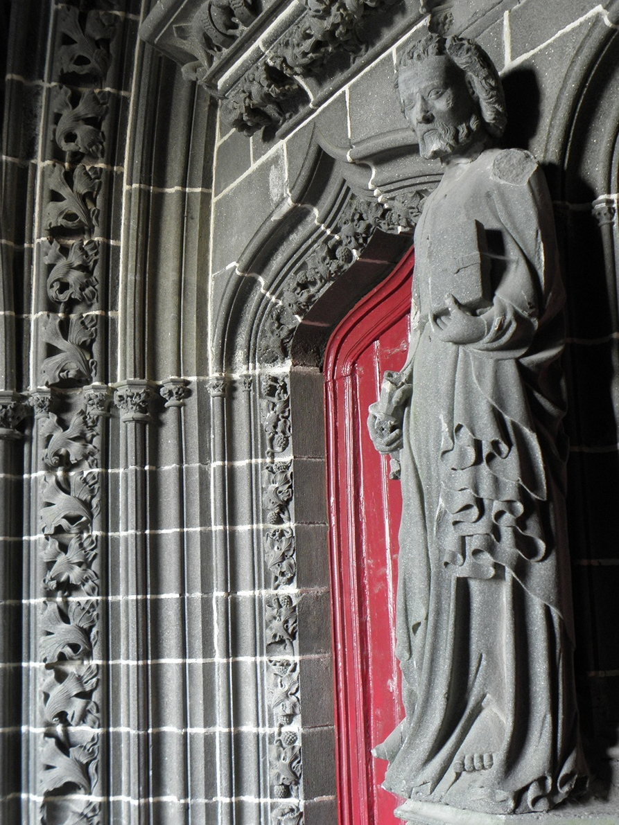 Statue au trumeau du porche de la basilique Notre-Dame du Folgoët (29). .